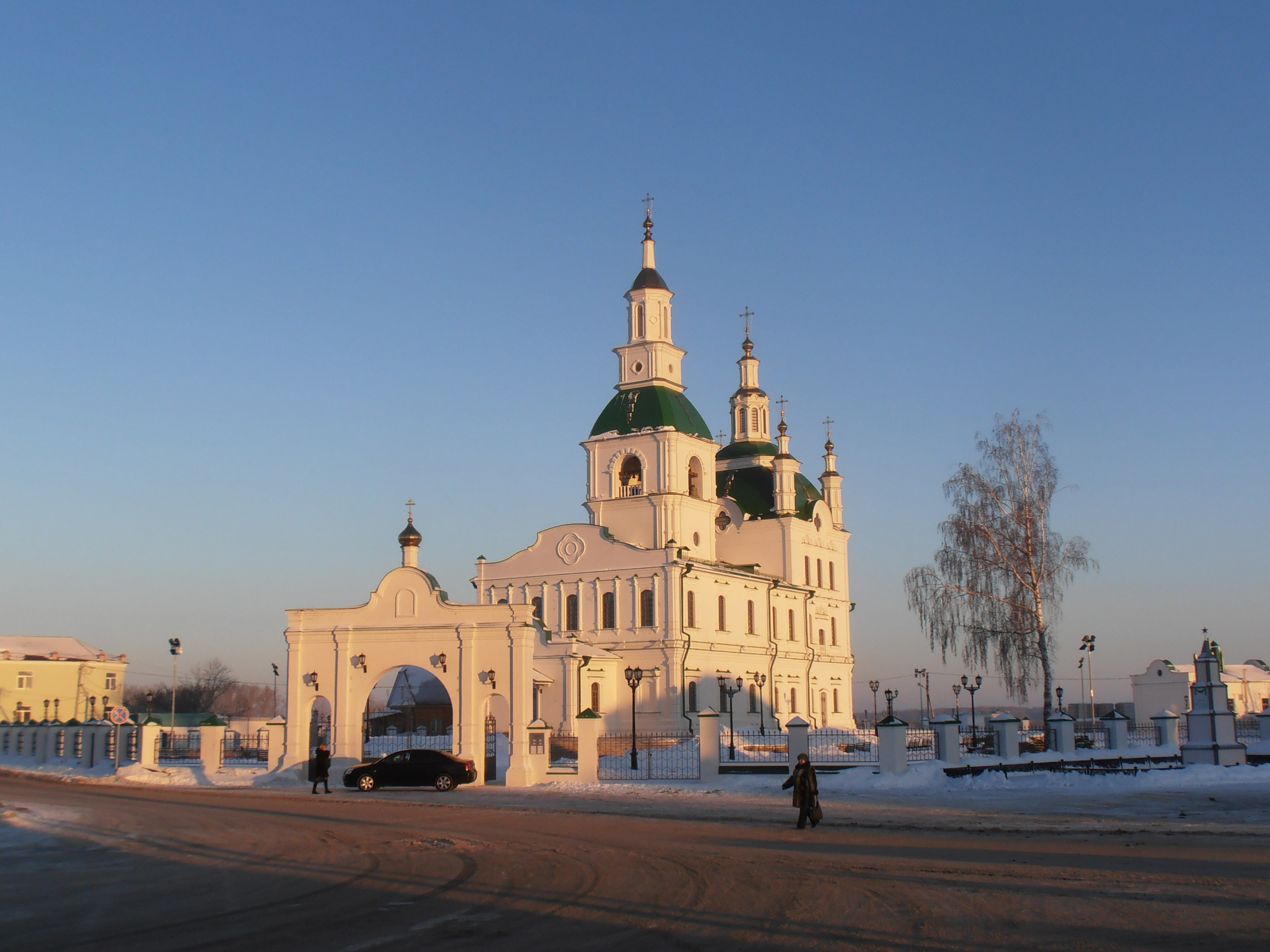 Второй Сретенский собор в Ялуторовске (Сретенская площадь, 1), восстановленный в 2010 году